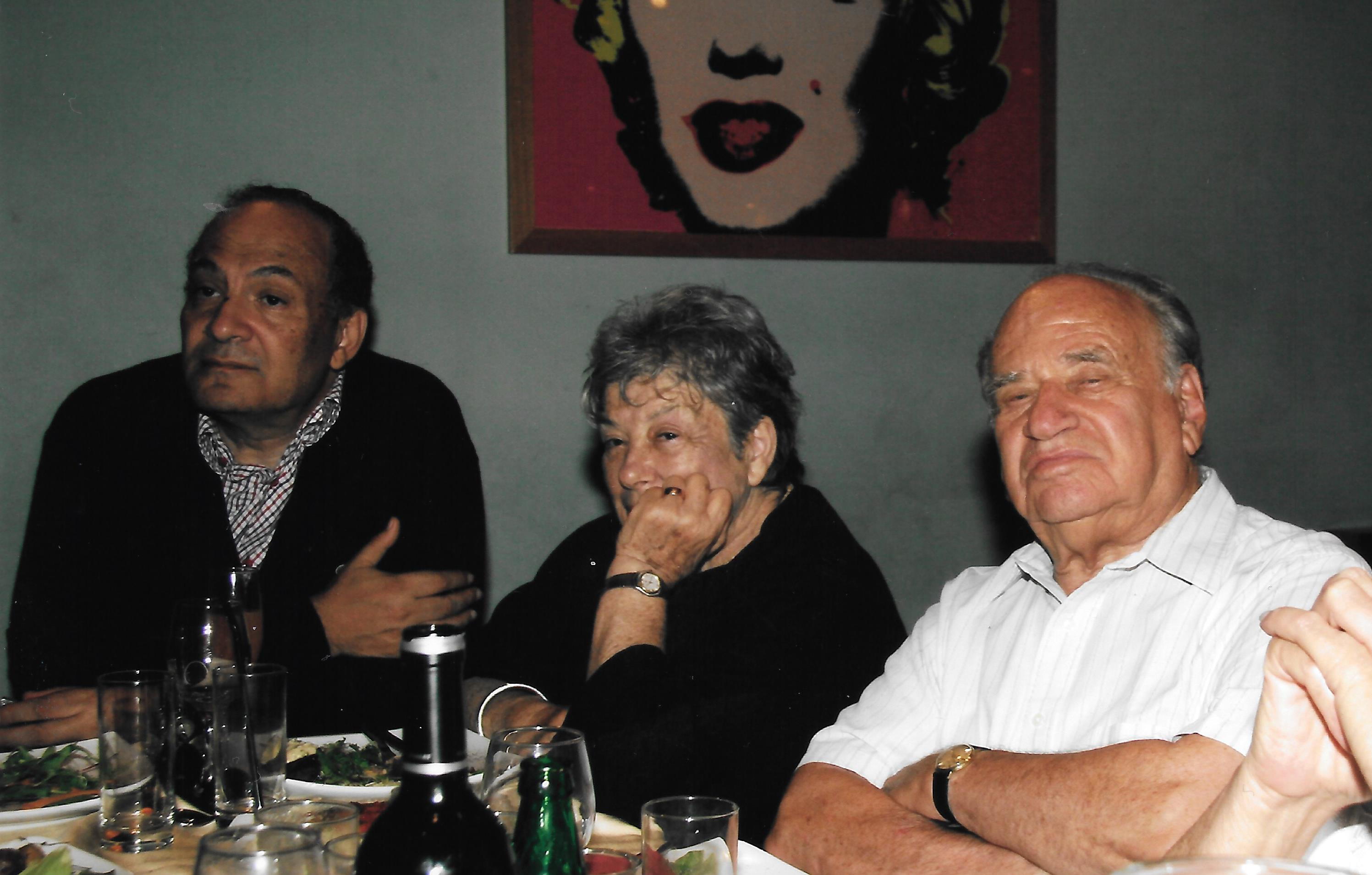 מוחמד עאסם איברהים שגריר מצרים בישראל ביחד עם אריה (לובה) וטניה אליאב במסיבה